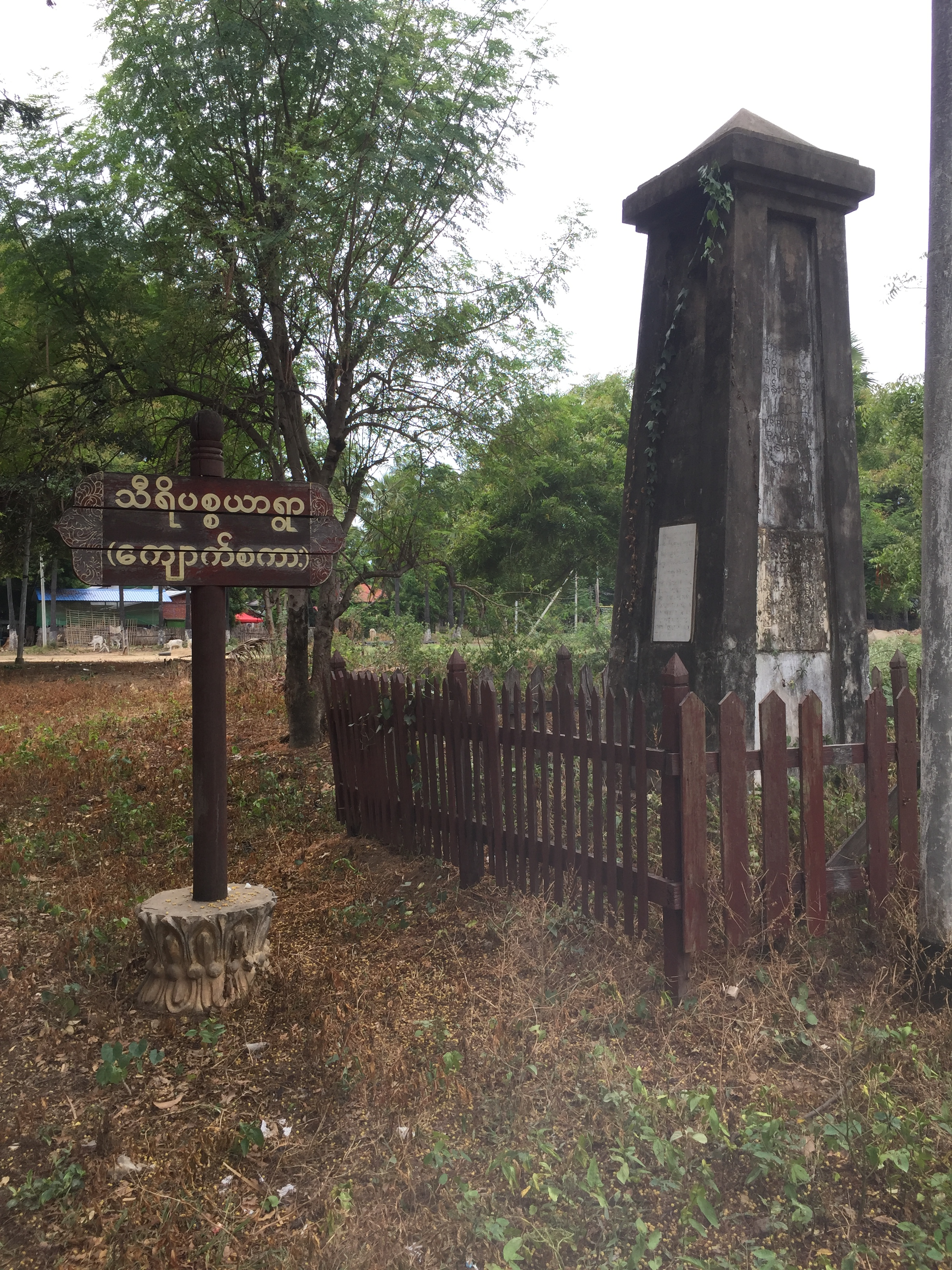 မြန်မာဘာသာ: သီရိပစ္စယာရွာ(ပုဂံမြို့သစ်)